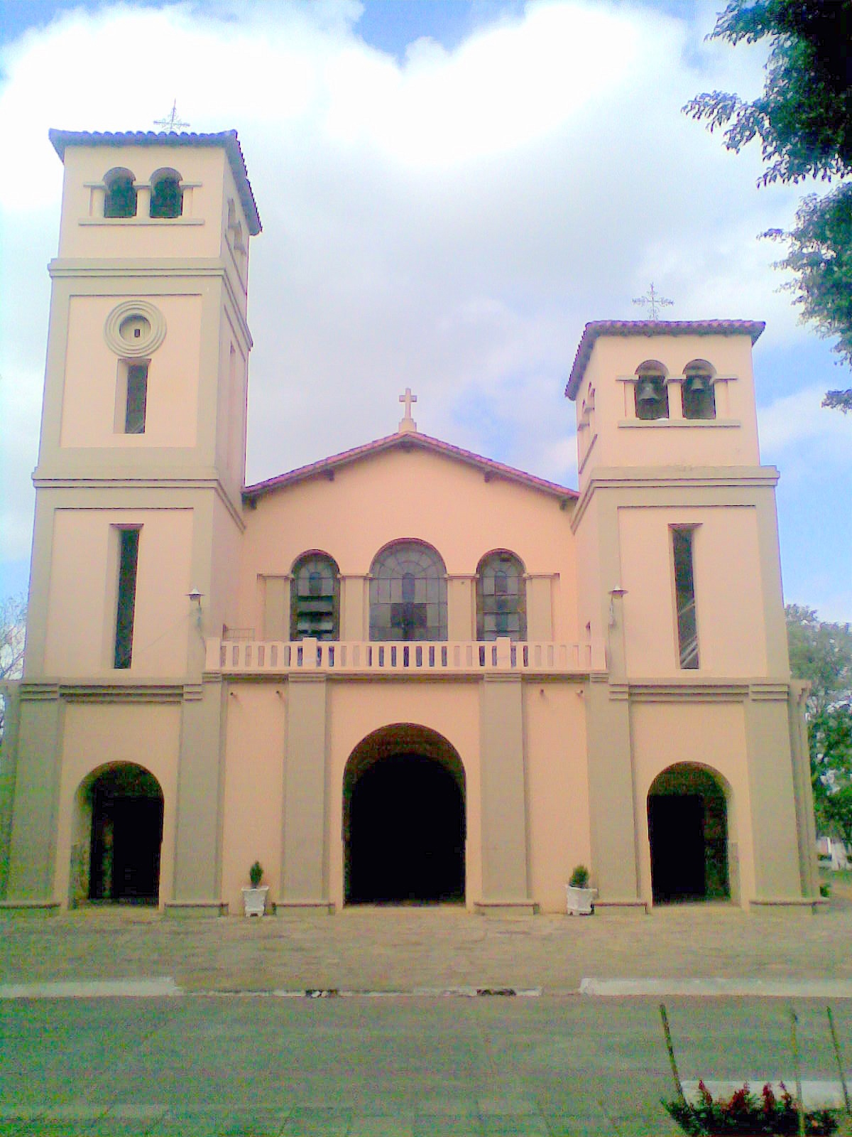 El Frente dela iglesi a las 9 hi de la mañana